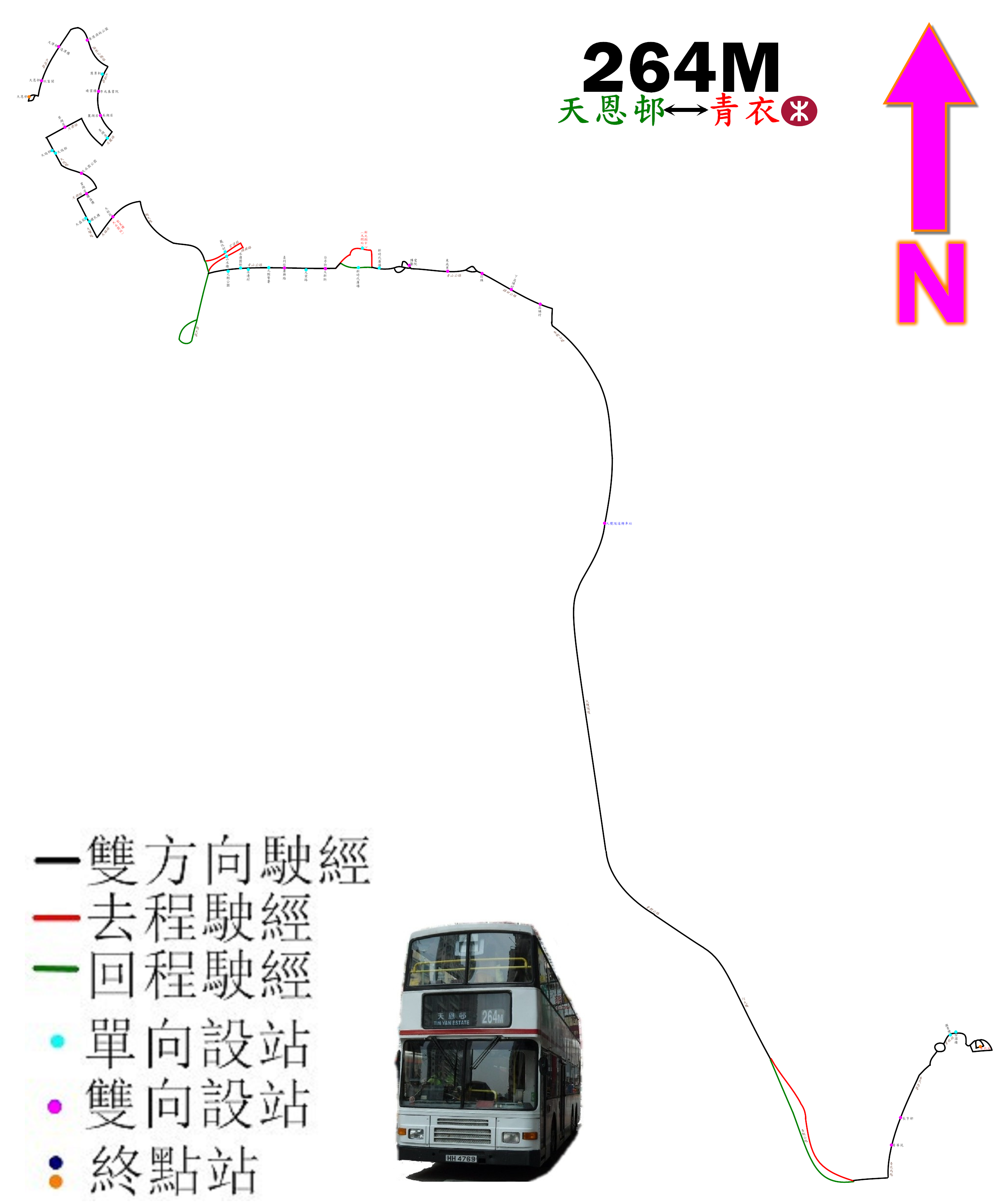 中文（香港）: 九巴264M線的走線圖